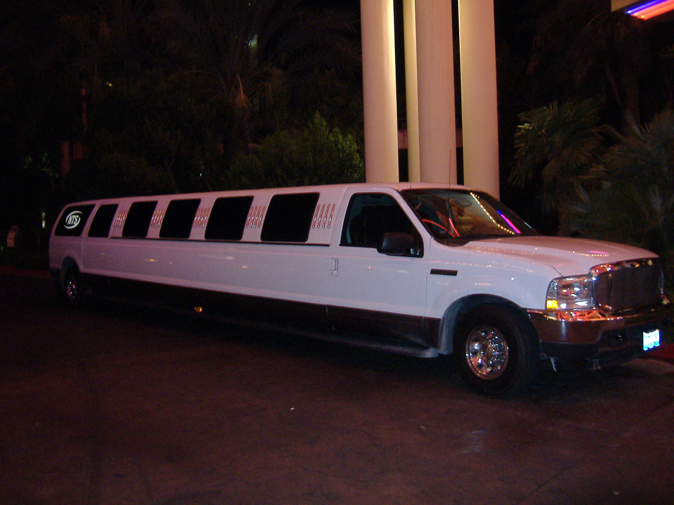 A limousine in Las Vegas, Nevada.